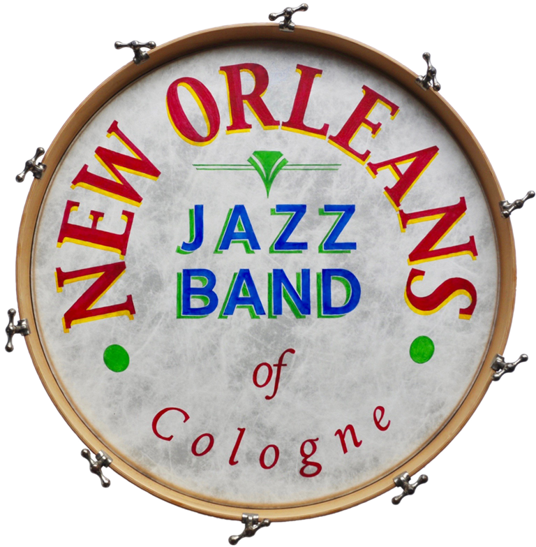 Bassdrum der NOJB